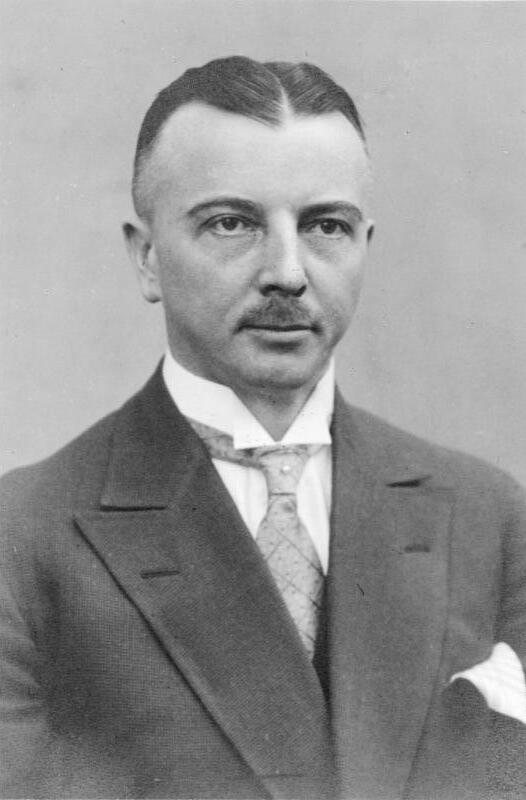 Scherl: Wilhelm Kissel, Direktor der Daimler-Benz A. G. feiert sein 25 jähr. Dienstjubiläum. 26363-29